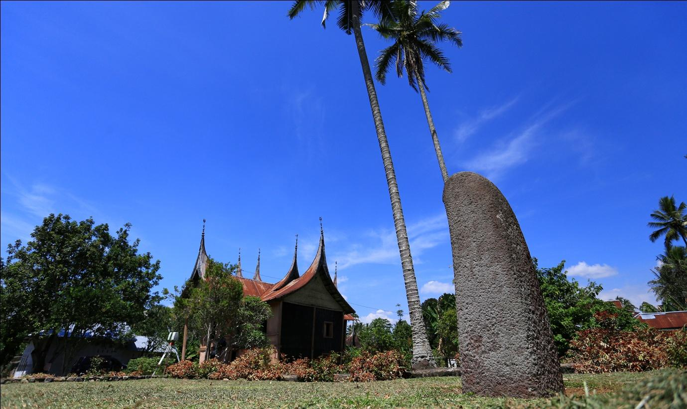 Menhir di Sumatra Barat